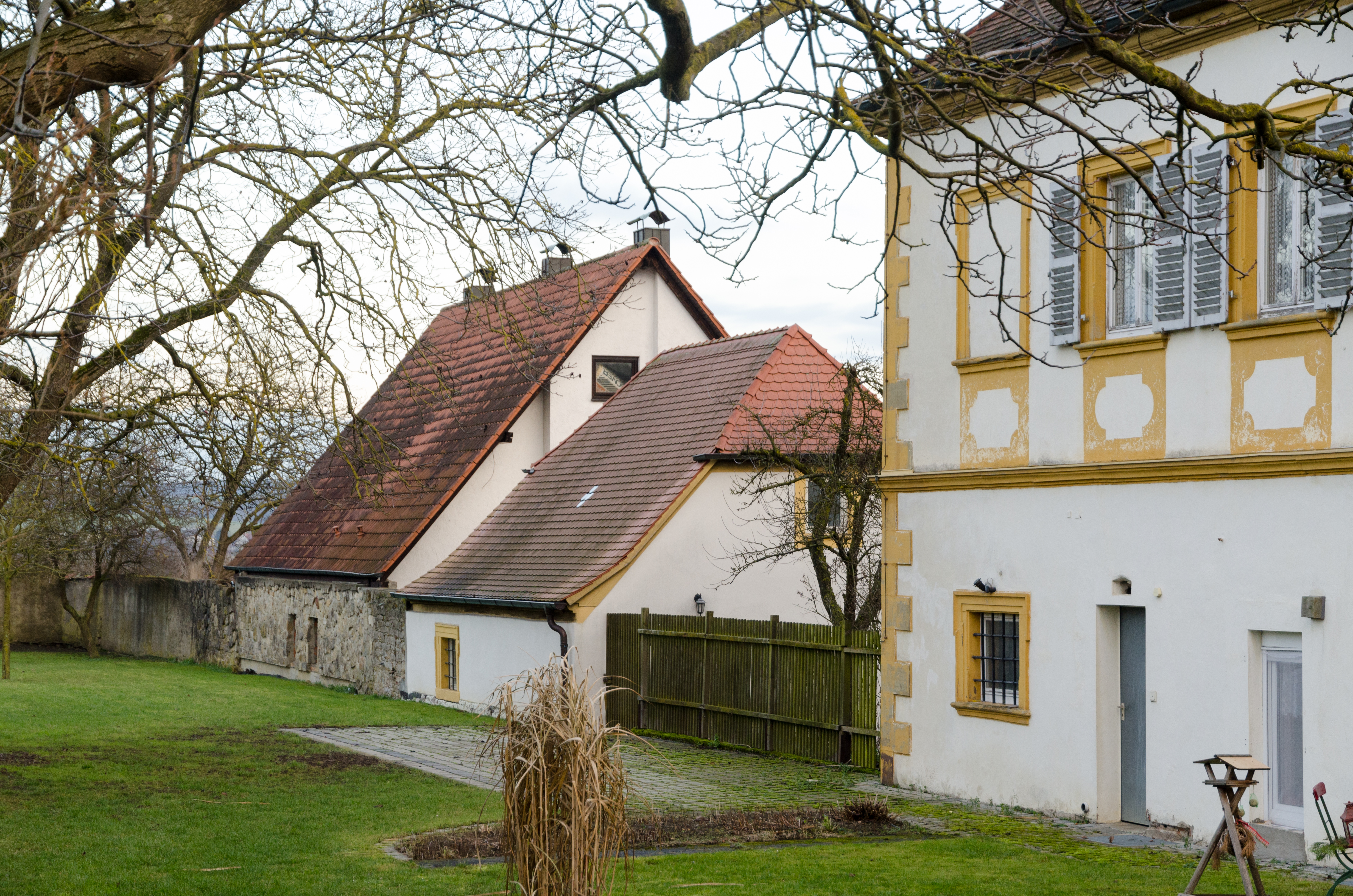 Gochsheim, Weyer, Erlenstraße 4